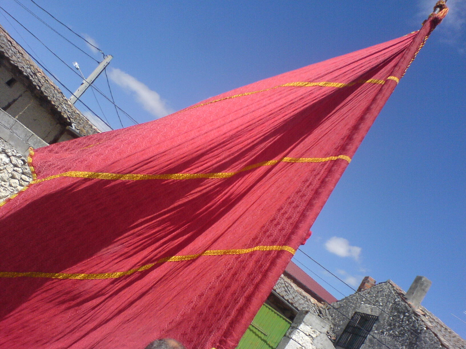 Pendón durante la fiesta de San Roque en Dehesa de Cuéllar.